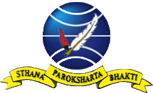 Logo Lembaga Sandi Negara